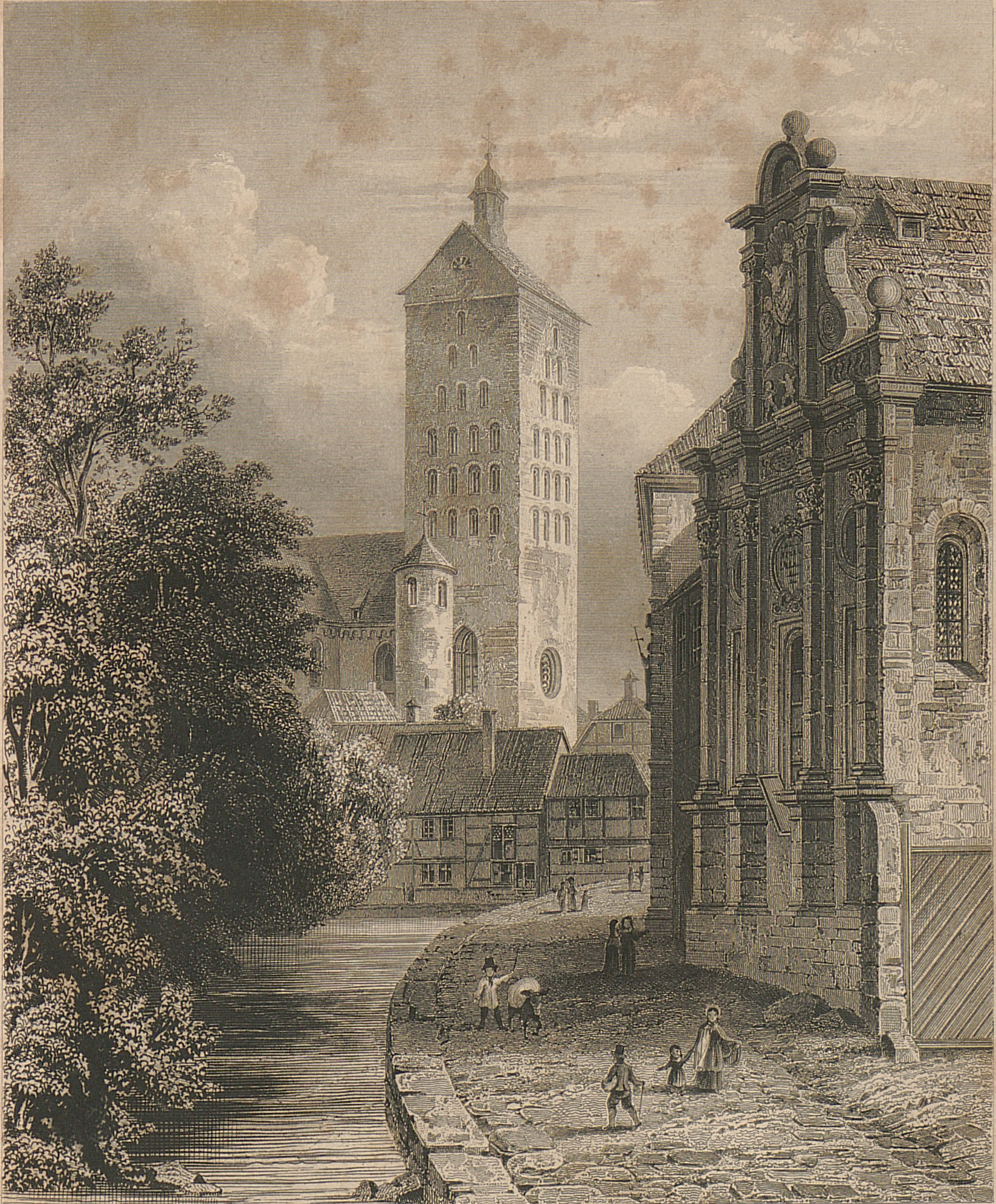 Michaelstraße in Paderborn – Rothobornpader, Dom, Kirche des Michaelklosters